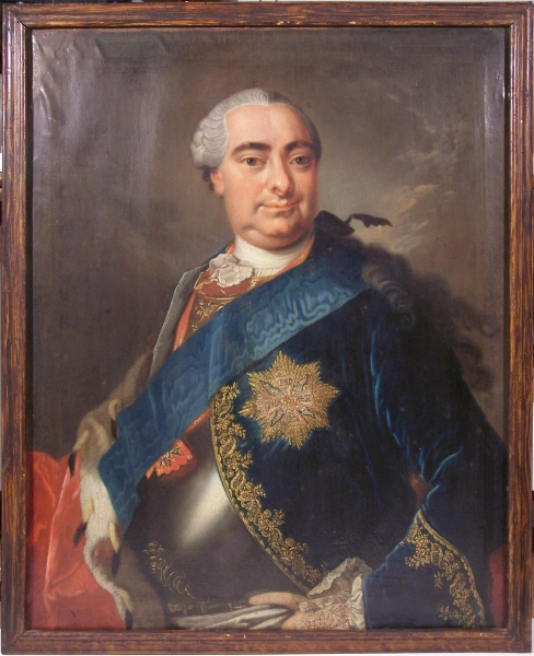 Das Ölbild zeigt ein Porträt des Herzogs Johann Friedrich von Schwarzburg - Rudolstadt (1721 - 1767) Verheiratet seit 1744 mit Herzogin Bernhardine von Sachse-Weimar-Eisenach